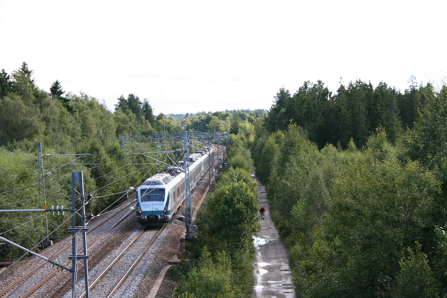 Type 72 like nord for Ås stasjon